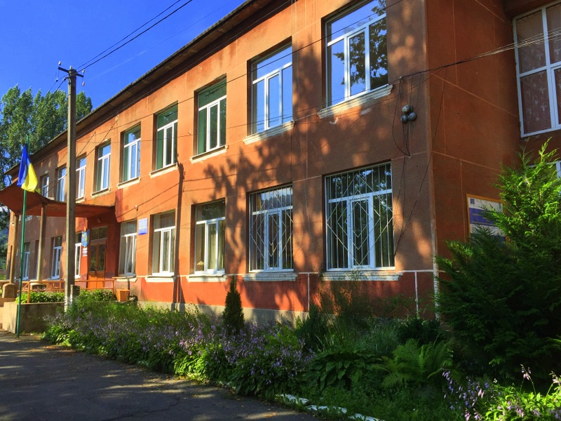 Загальноосвітня школа в Калинах. Центральний вхід